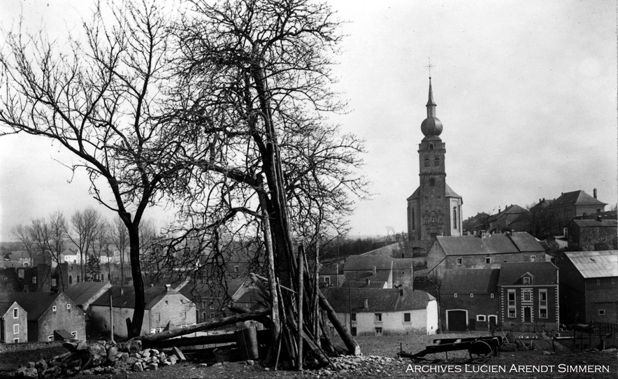 Vue à partir du lieu-dit Fockegaart sur l'église. A gauche au fond, derrière les arbres, l'on peut entrevoir les ruines du château féodal de Koerich.